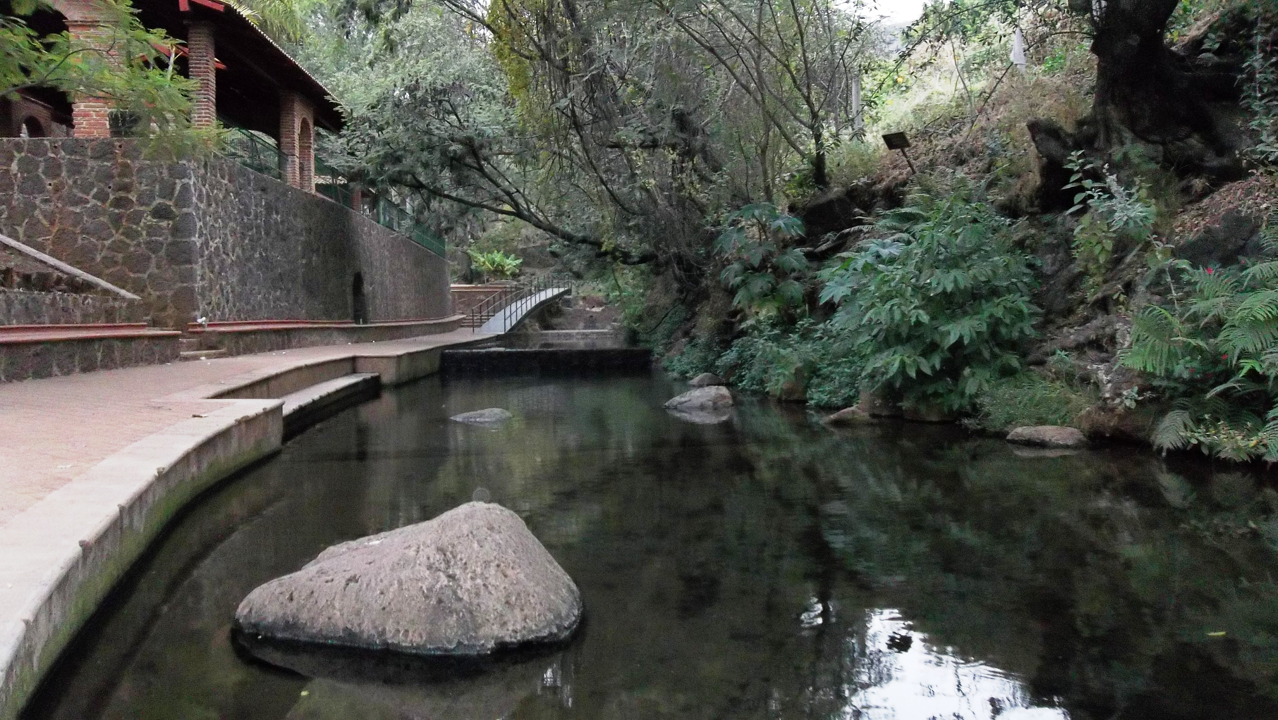 Parque acuático recreativo y familiar